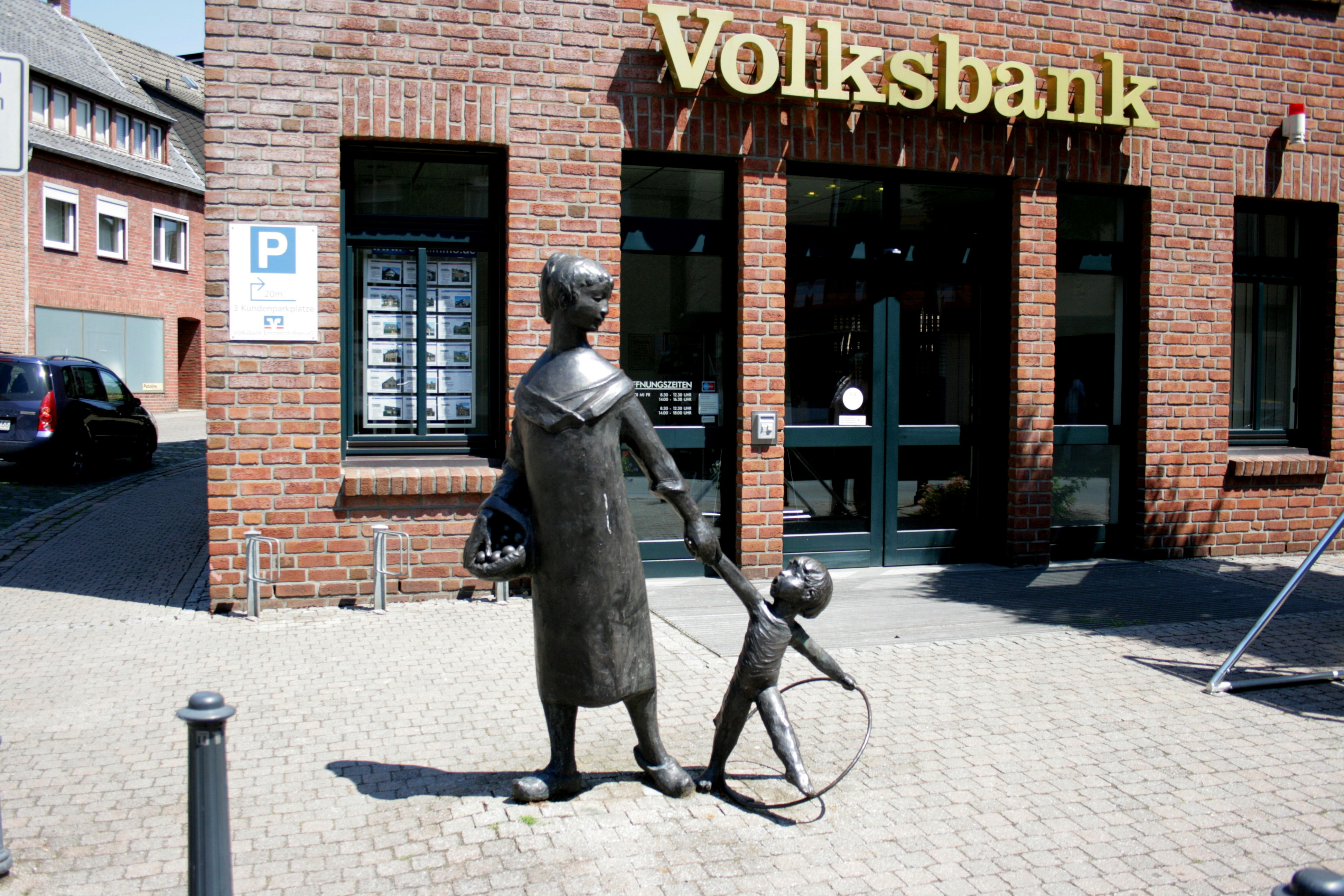 Marktfrau mit Eierkorb und Kind - 'Eierfrau' von Dieter von Levetzow in der Niederstraße in Anholt, Isselburg